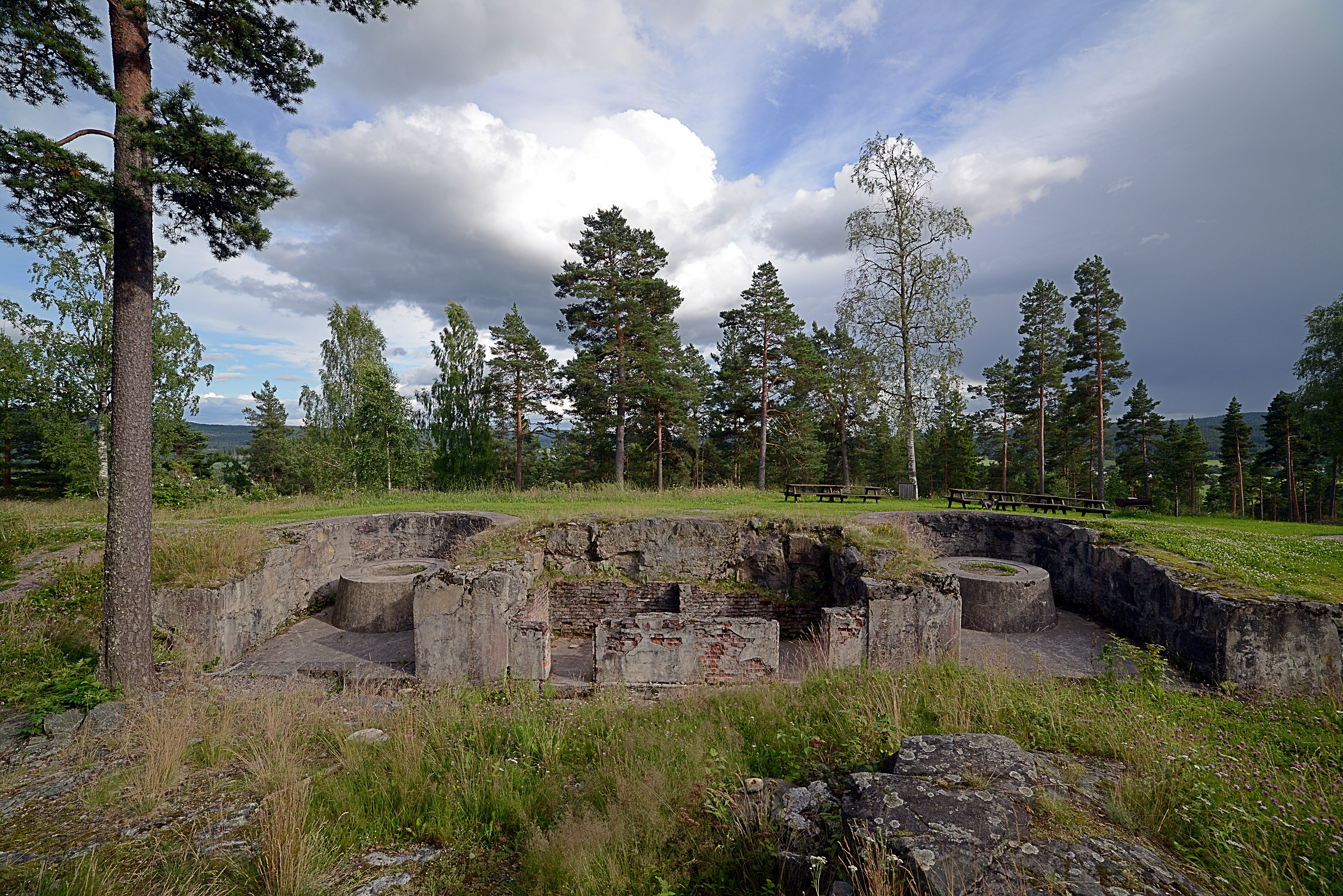 Urskog fort